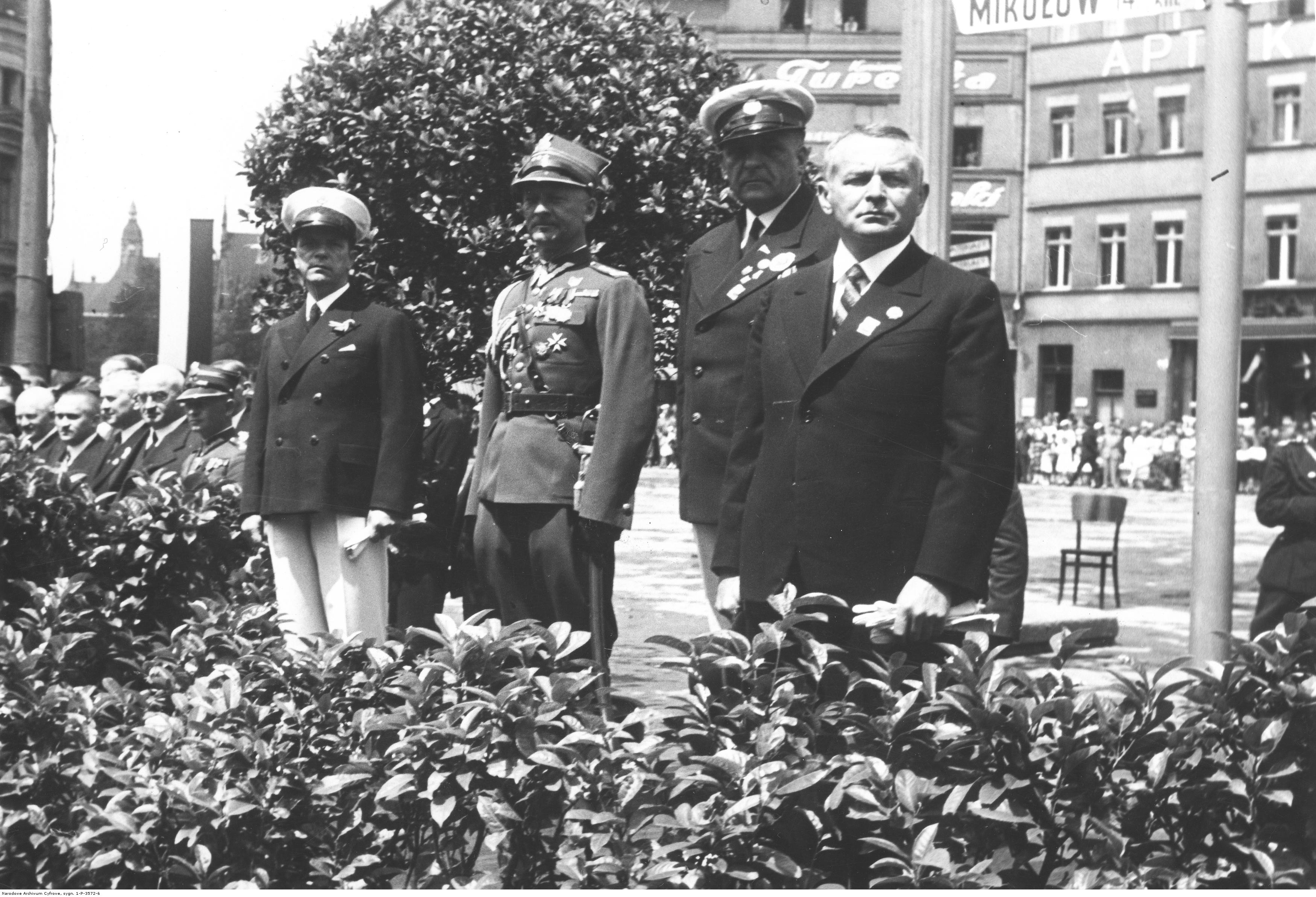 Obchody Święta Morza w Katowicach; 1937 r. - trybuna honorowa. Widoczni m.in.: wojewoda śląski Michał Grażyński (1. z prawej), płk Władysław Powierza (2. z lewej), wicewojewoda śląski Tadeusz Saloni (1. z lewej). Koncern Ilustrowany Kurier Codzienny - Archiwum Ilustracji. Sygnatura: 1-P-3572-6